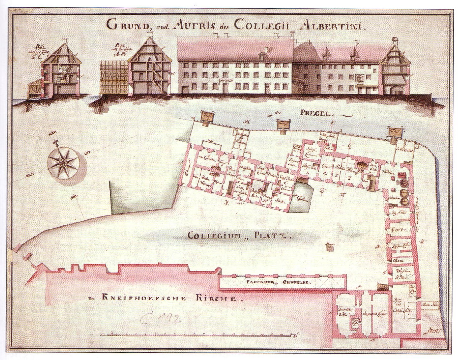 Aufriss des Collegium Albertinum auf der Dominsel (Kneiphof) in Königsberg in Preußen